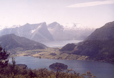 Eidsbygda